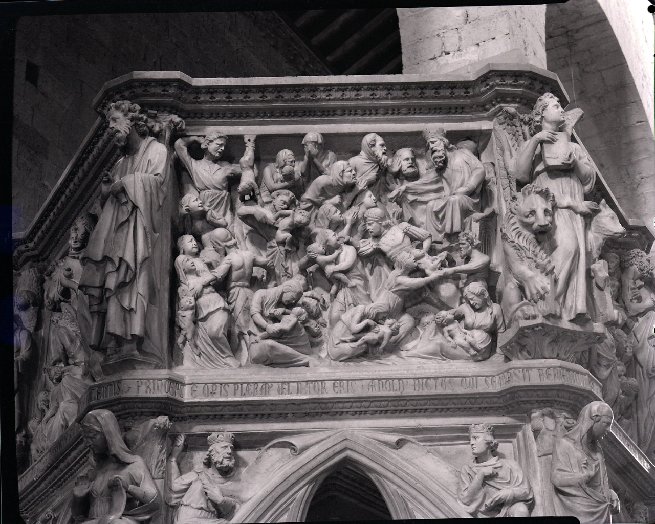 Servizio fotografico : Pistoia, 1965 / Paolo Monti. - Buste: 6, Fototipi: 6 : Negativo b/n, gelatina bromuro d'argento/ pellicola ; 10x12. - ((Serie costituita da 6 negativi identificati con i nn.: 11068-11078. Sulle buste iscrizioni manoscritte.La suddetta serie è contenuta nella scatola identificata con la numerazione G11001-11500. - Occasione: Documentazione per la pubblicazione: "Emilio CECCHI, Natalino SAPEGNO (a cura di), Storia della Letteratura Italiana, 9 voll., Milano, Garzanti, 1966 e segg.". - Fonte: Rubrica di Paolo Monti: Monti/ 2/ 6 giugno 1964 - 31 marzo 1966/ 8194-12420 (1964-1966), presso Archivio Paolo Monti